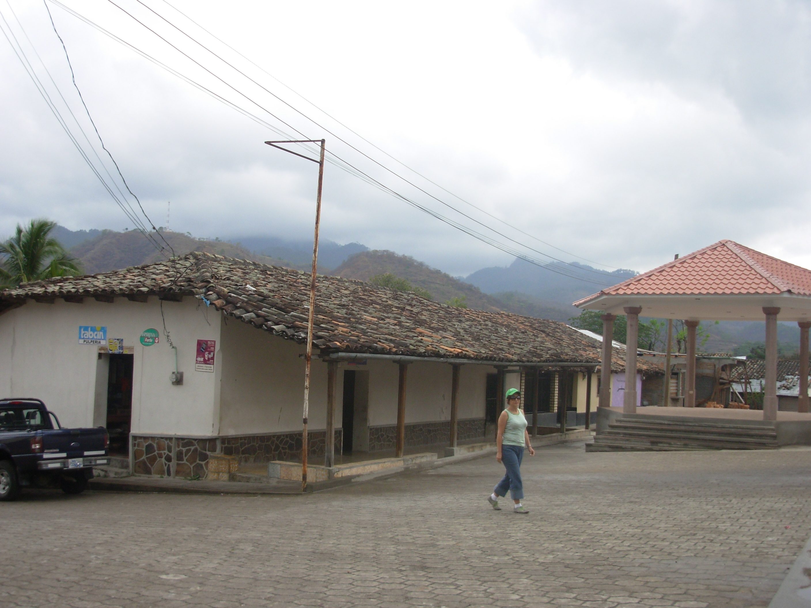 Portales de Santa Fe (Ocotepeque, Honduras).